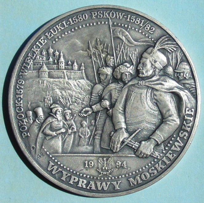 Medal Stefan Batory (rewers) - wyprawy moskiewskie